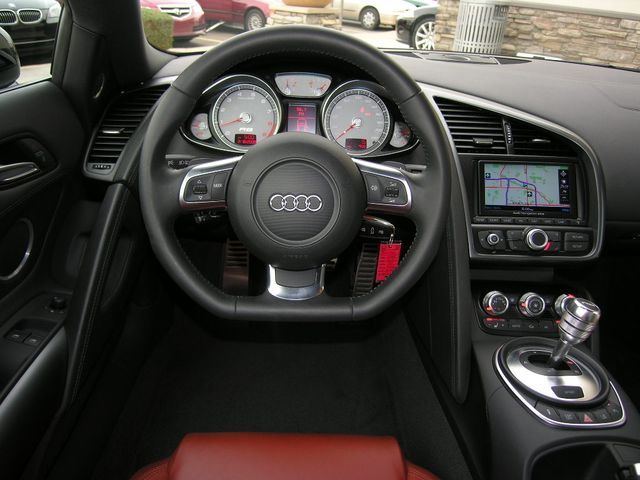 Lenkrad des Audi R8